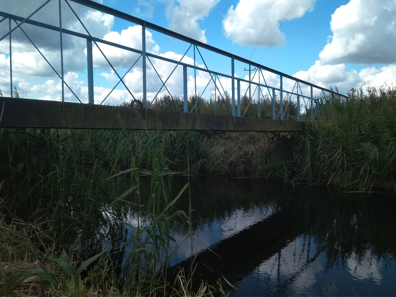 пешеходный мост через реку Перетуть между деревнями Клыповщина и Вишнёвка